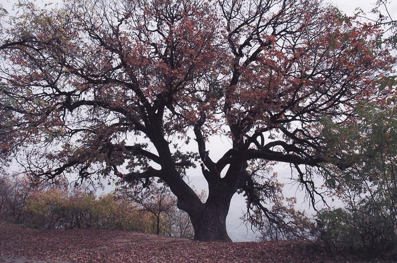 Дуб-патриарх в Дубовке